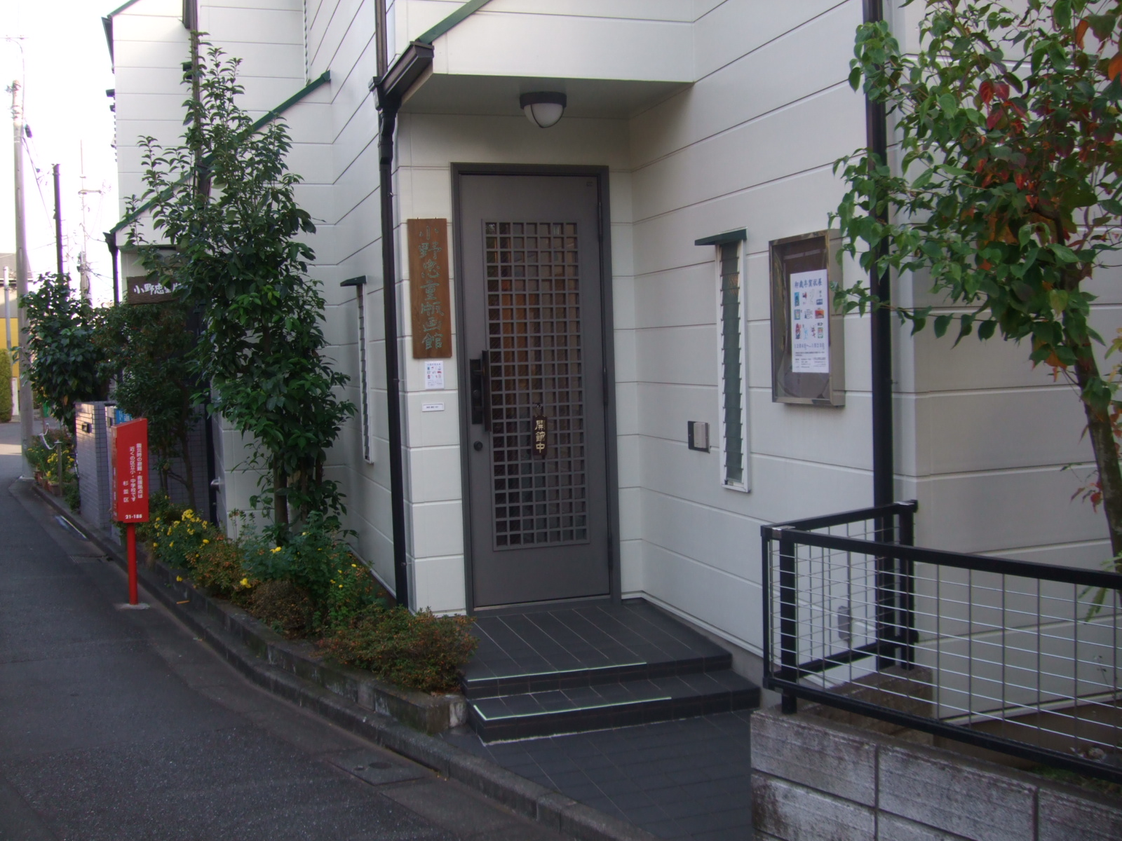 東京都杉並区にある小野忠重版画館。